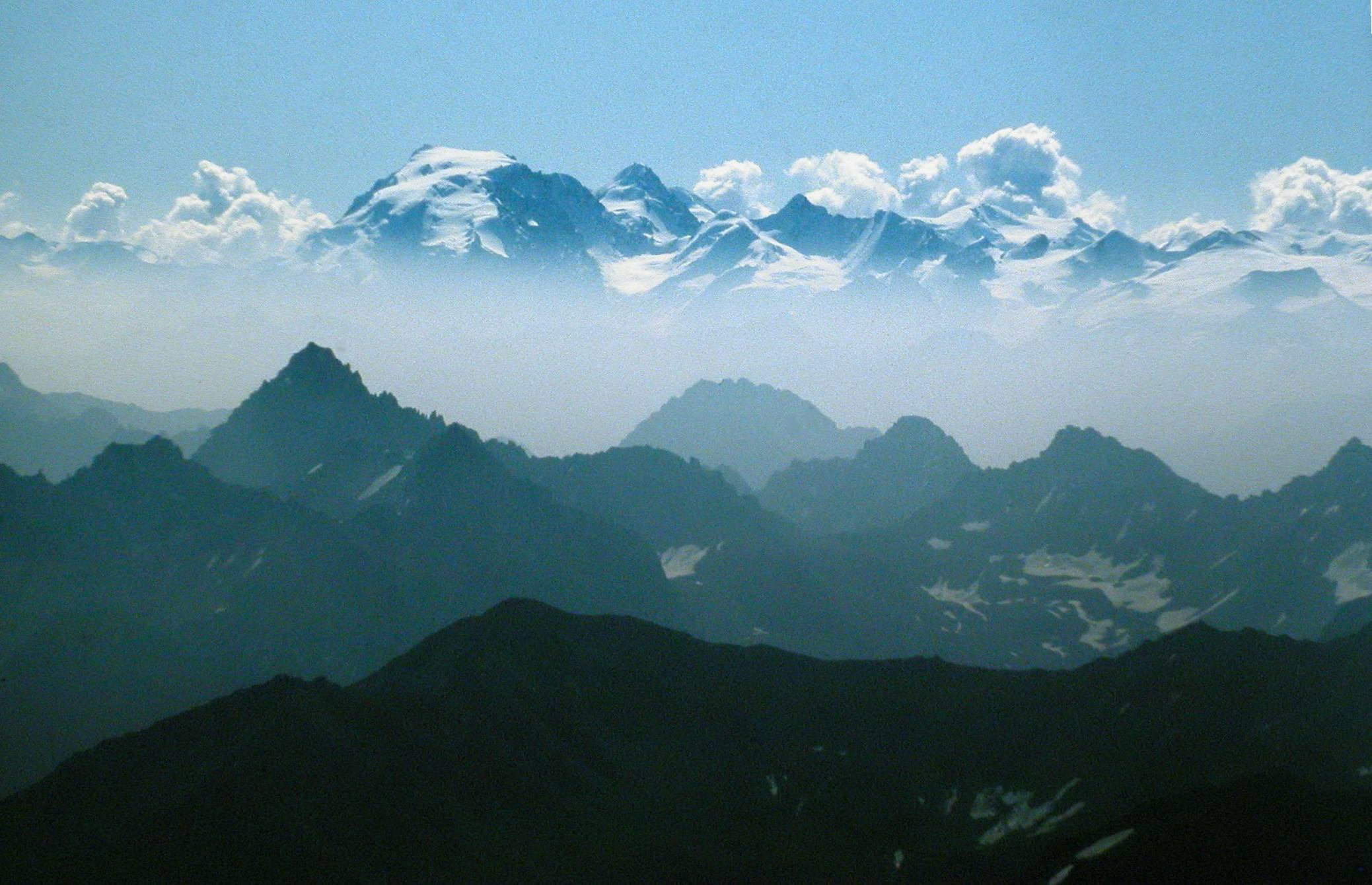 Blick vom Gipfel des Piz Linard (Silvretta) auf den ca. 50 km entfernten Ortler, aufgenommen mit 300mm-Teleobjektiv